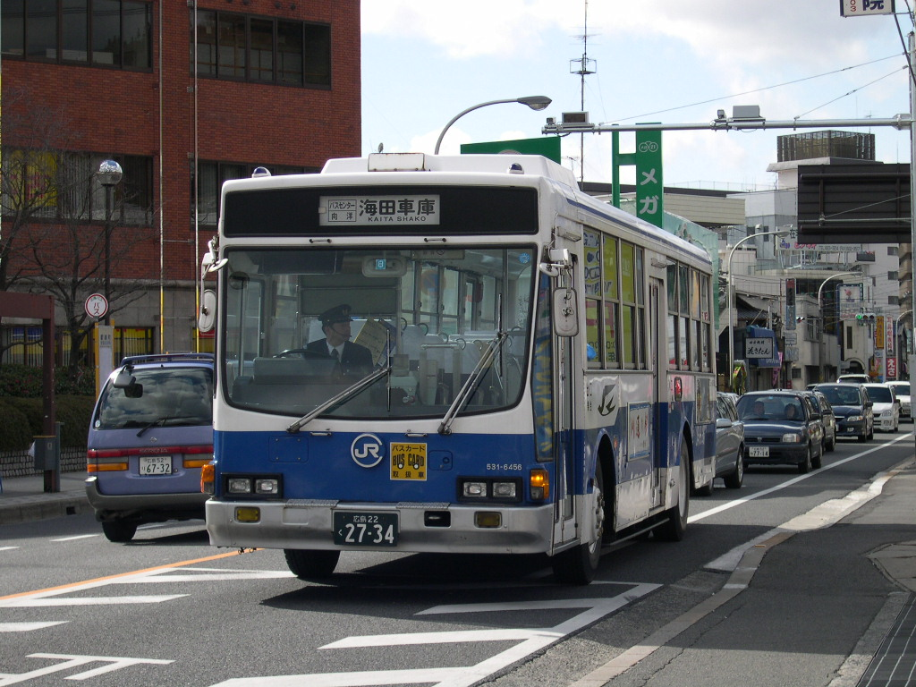 方向幕は「かいた車庫」「海田車庫」と、なっていた。